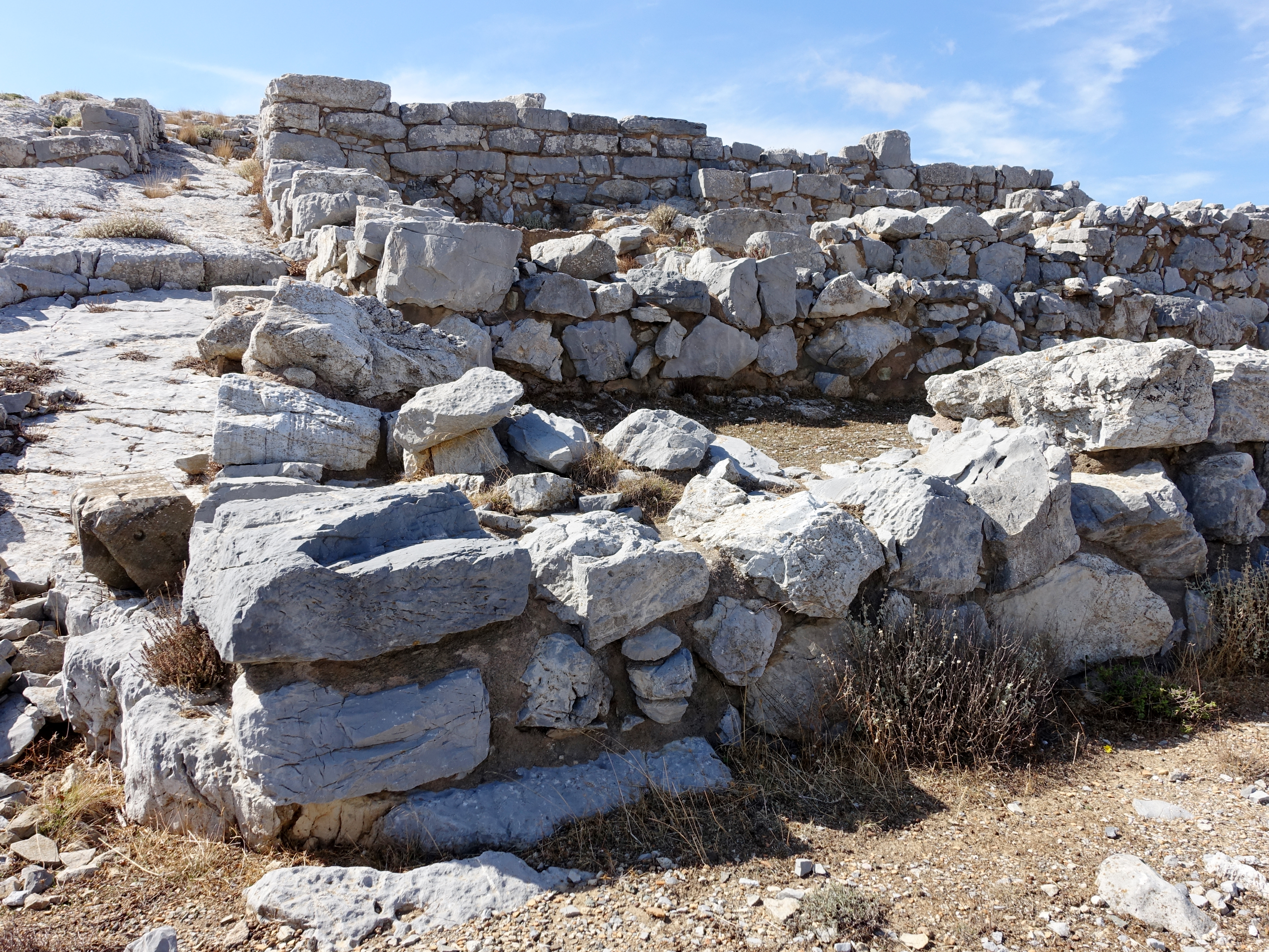 Minoisches Gipfelheiligtum auf dem Giouchtas (Γιούχτας), Kreta, Griechenland